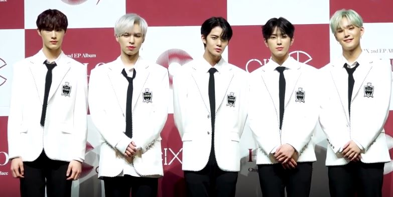 ‘CIX’ 두 번째 미니앨범 ‘HELLO Chapter 2. Hello, Strange Place’ 쇼케이스가 19일 오후 서울 광진구 광장동 예스24 라이브홀에서 열렸다.